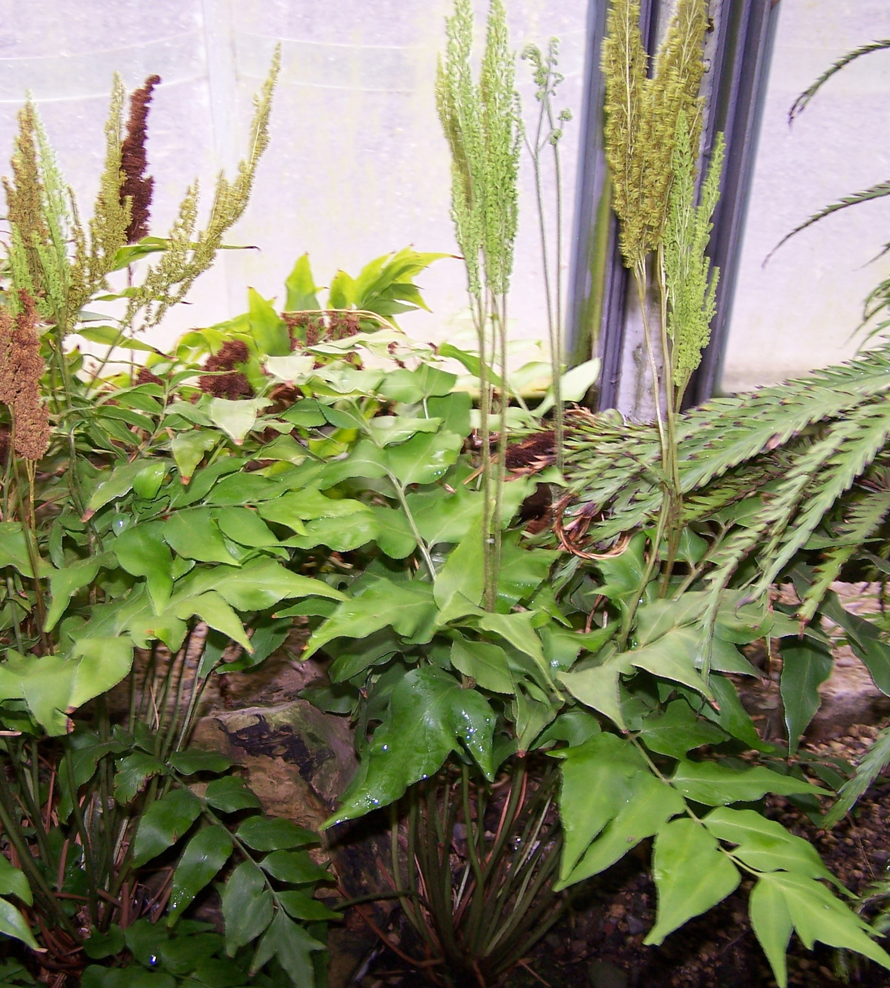 Anemia mexicana 17 juin 2006 Vieux jardin botanique de Göttingen